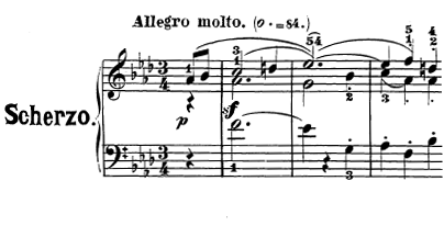 Compassos iniciais do segundo movimento da Sonata Op. 26 de Beethoven